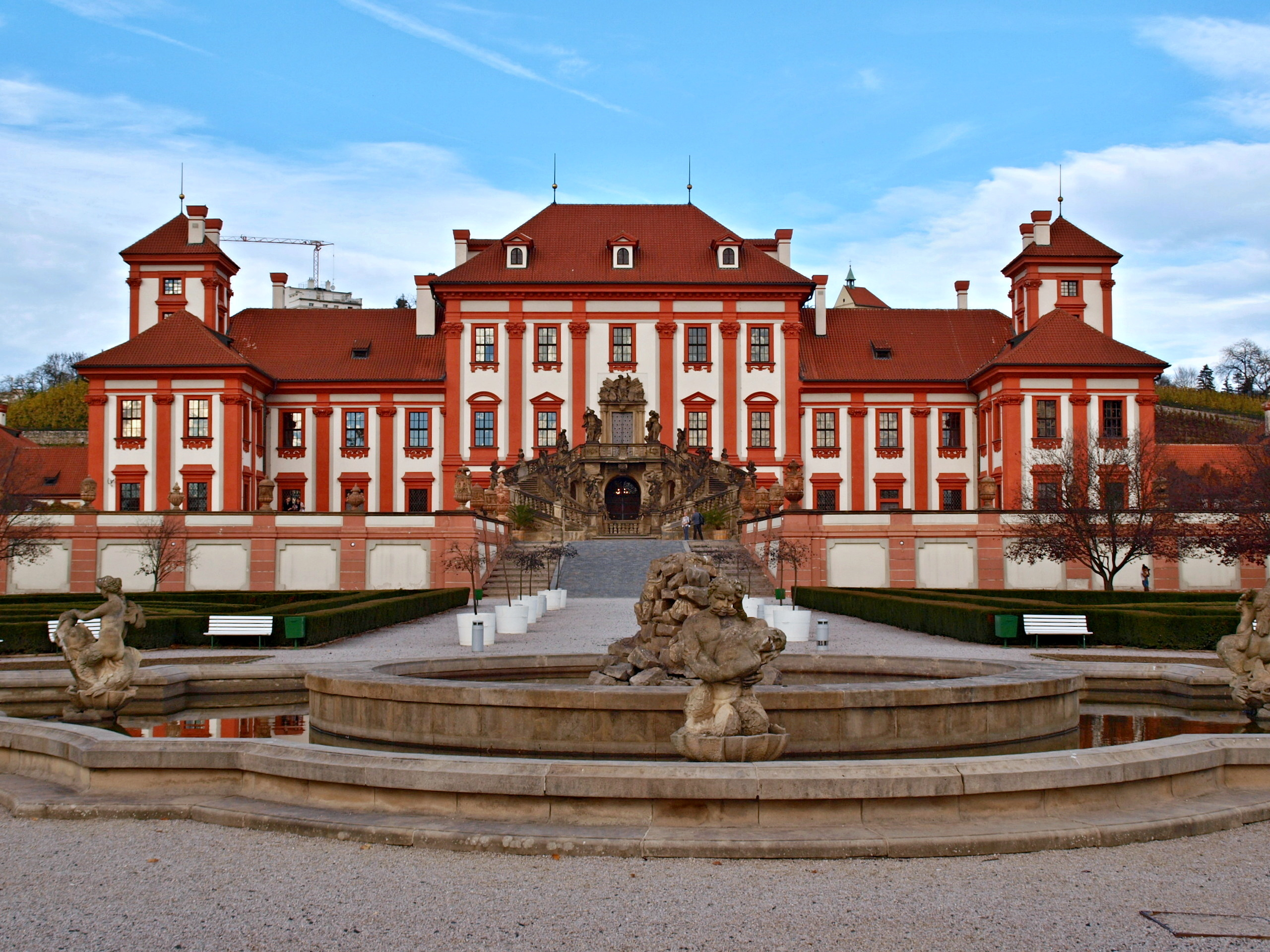 Trojský zámek